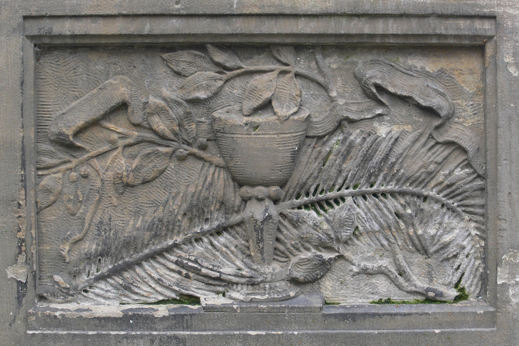 Gustav-Adolf-Brunnen von 1911 an der Predigerkirche in Erfurt